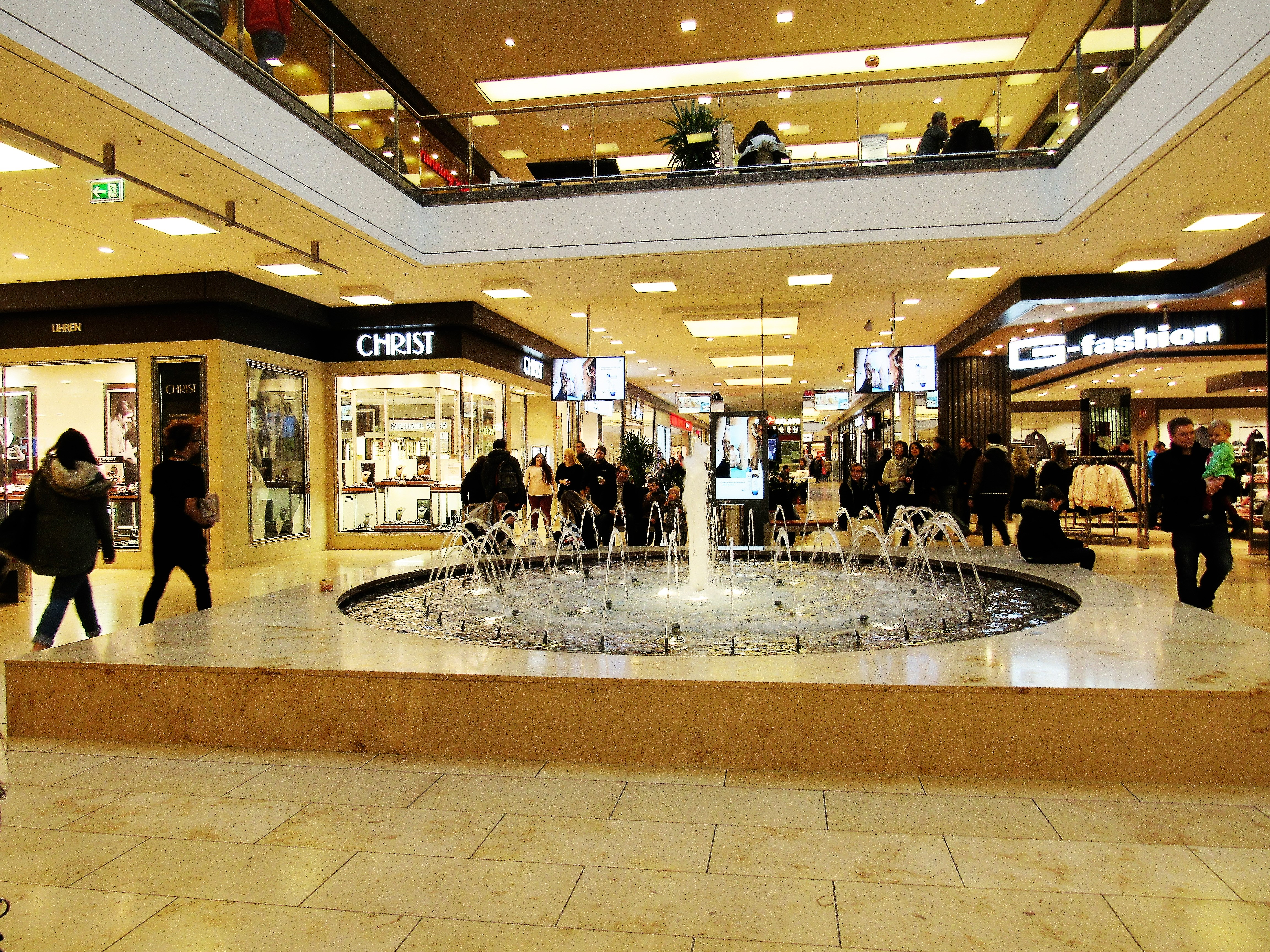 Einkaufsgalerie Schweinfurt